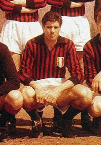 Il calciatore italiano Sandro Salvadore al Milan al termine della stagione 1961-62, culminata con la vittoria del campionato italiano di Serie A.